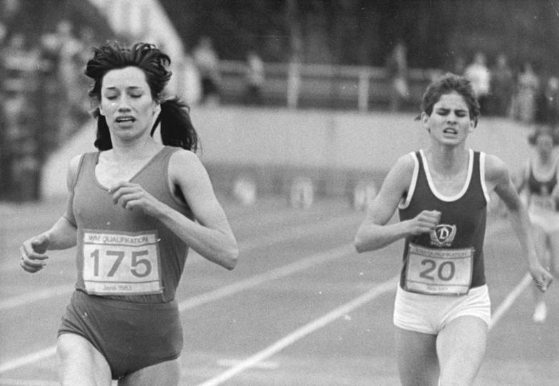 Gabriele Meinel, Jeanette Hain ADN-ZB Kasper 28.5.83-BL-Bez. Gera: Leichtathletik- DDR-Meisterin über 3000 m wurde auf dem Leichtathletik-Sportfest in Jena Gabriele Meinel (Lok Cottbus) mit 9:06,87 vor Jeanette Hain (SC Dynamo Berlin), 9:07,77.